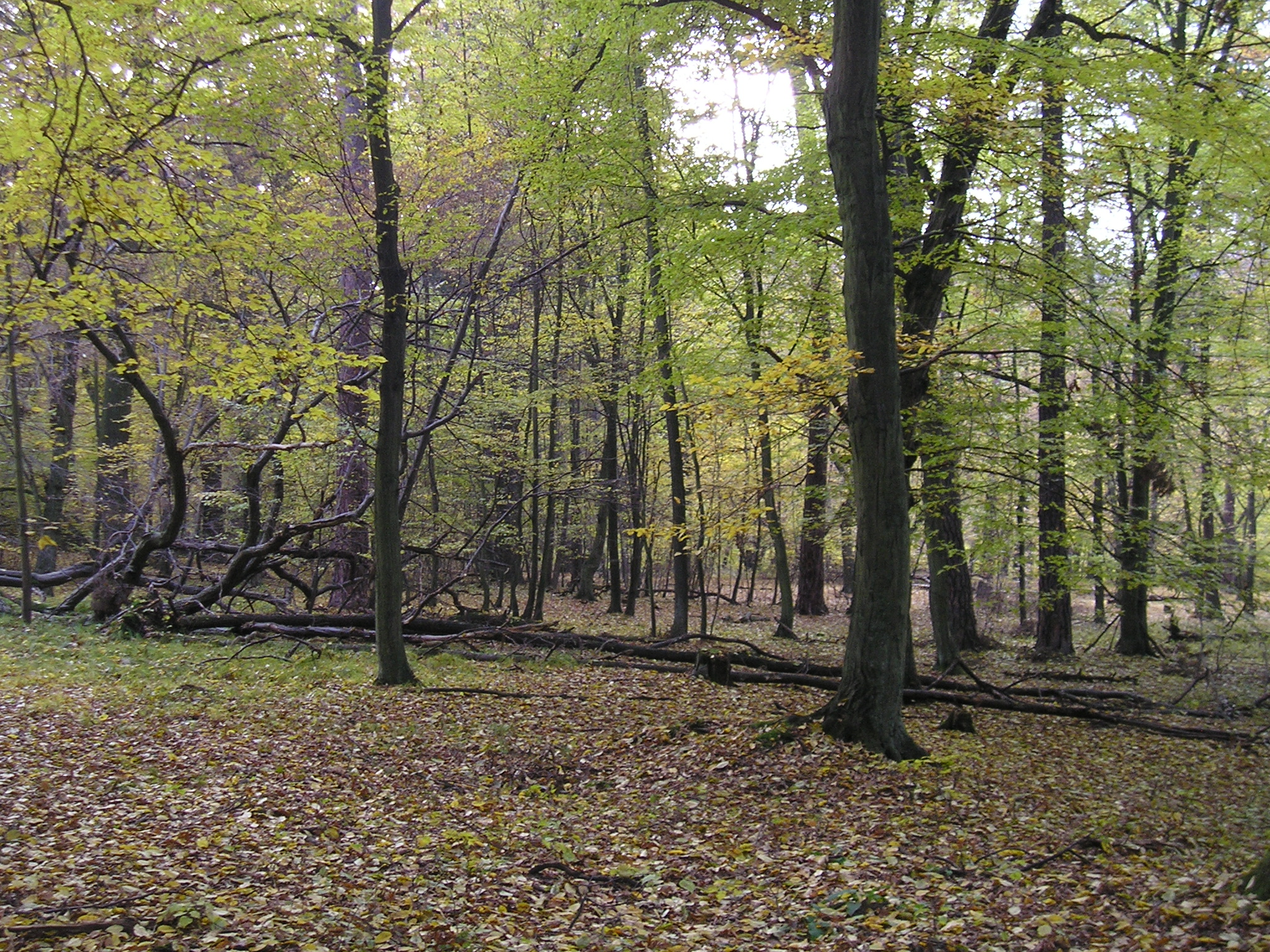 Mladý samoobnovující se les dubohabřin.